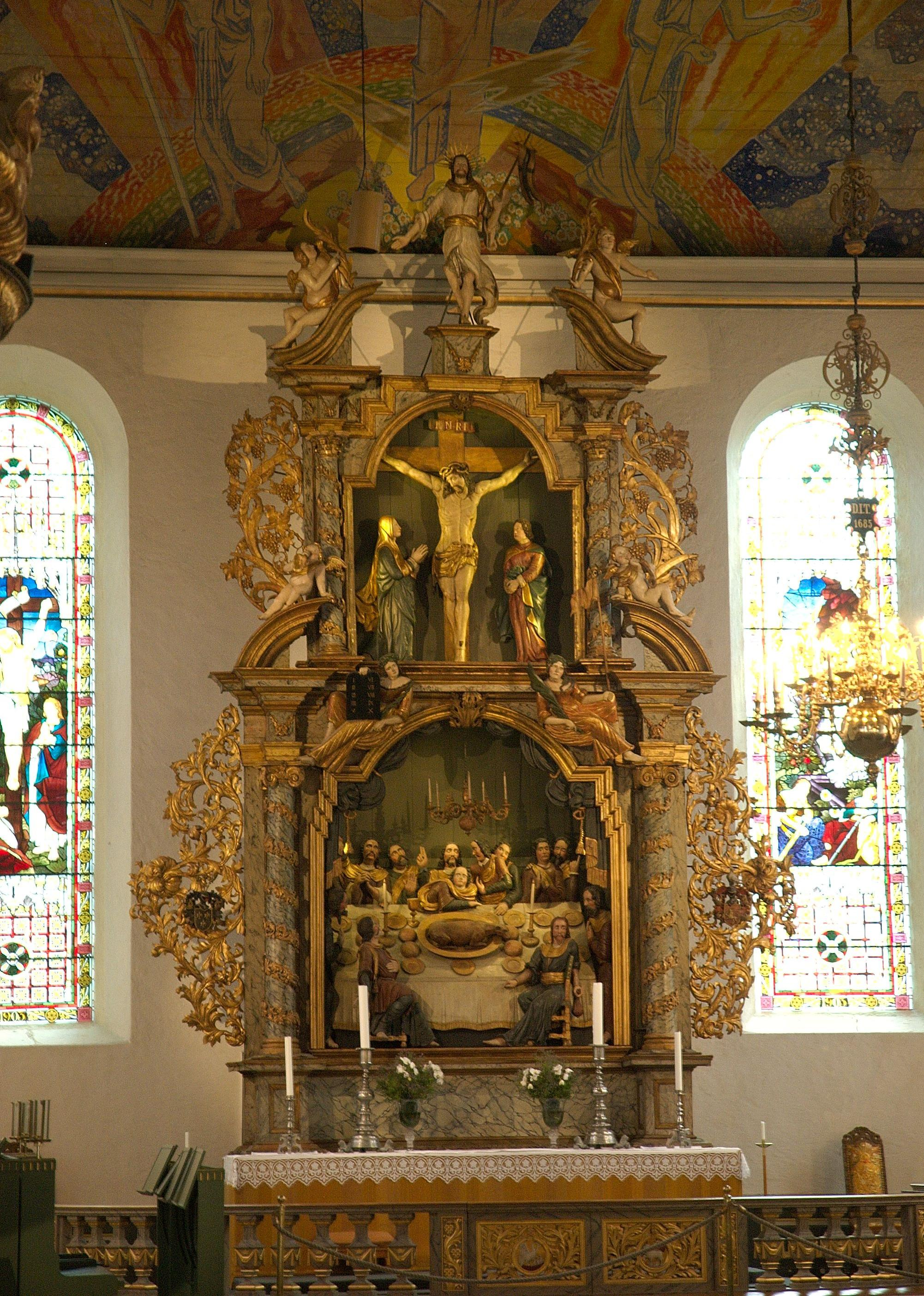 Altertavlen i Oslo Domkirke